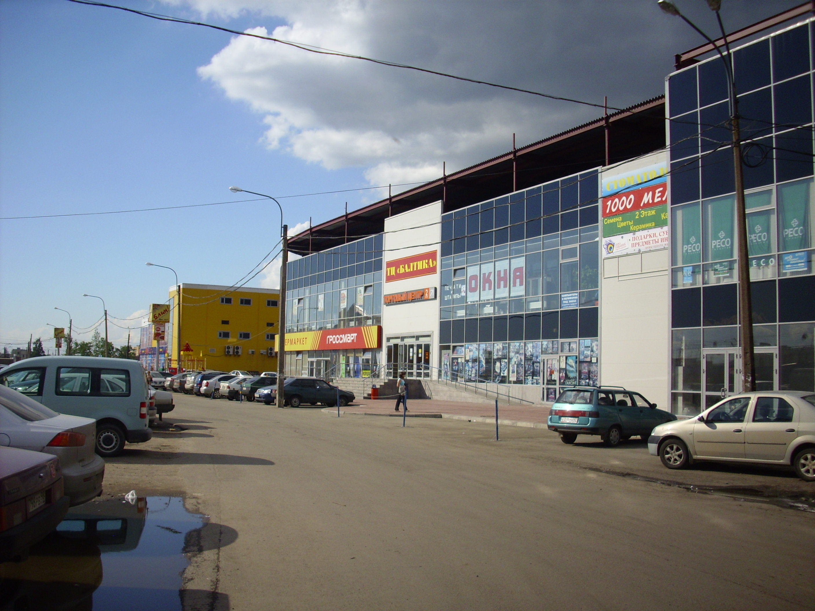 Nevskiy rayon, Sankt-Peterburg, Russia